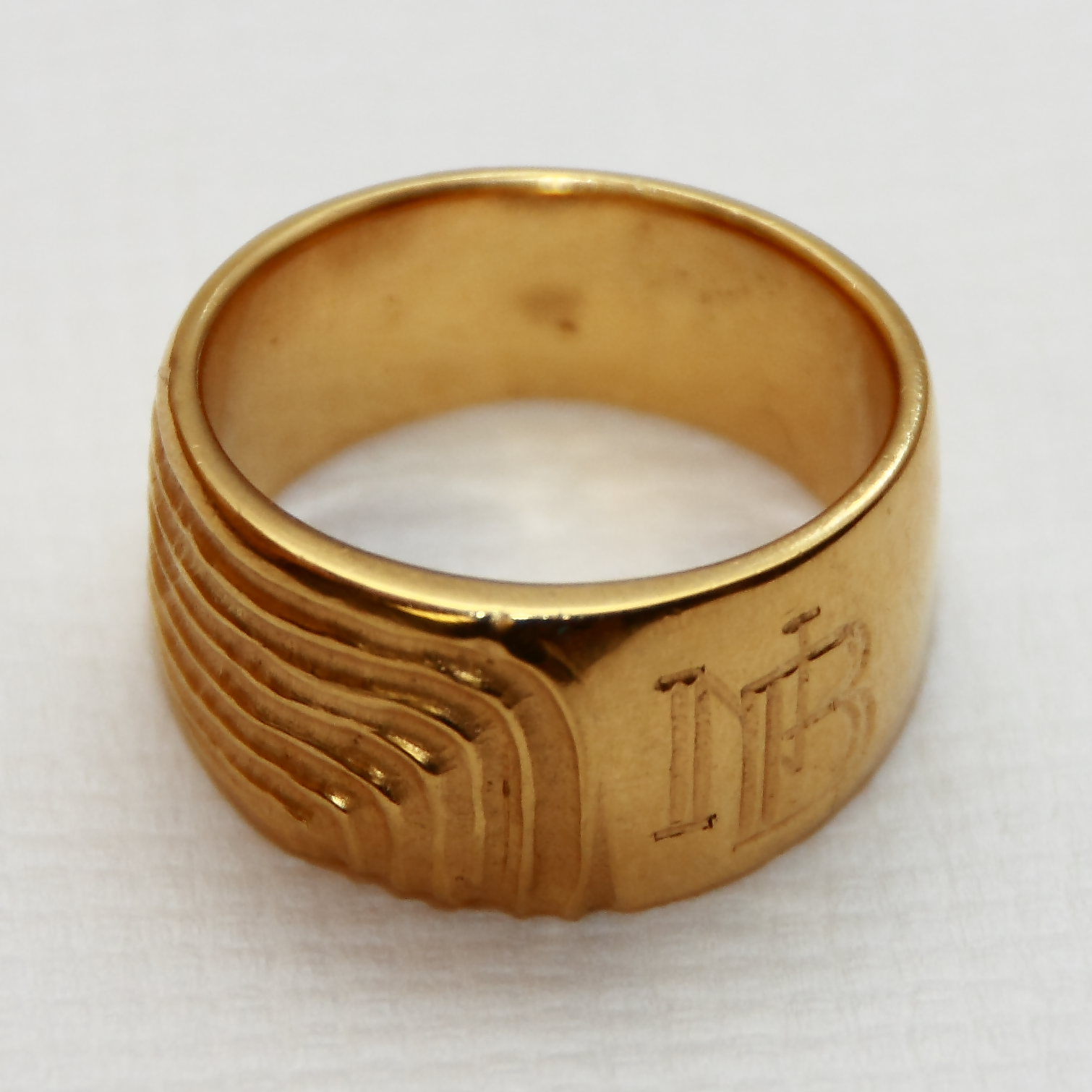 Der Gottlob-Haag-Ehrenring für Norbert Bach, gestaltet vom Bad Mergentheimer Goldschmied Helmut Frauenberger.